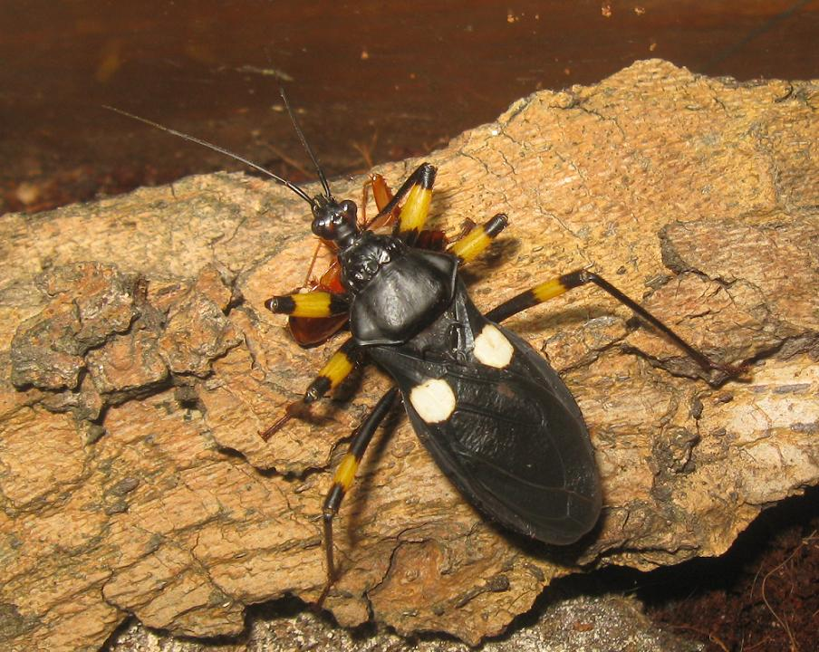 Kétpettyes rablópoloska hímje táplálkozás közben.